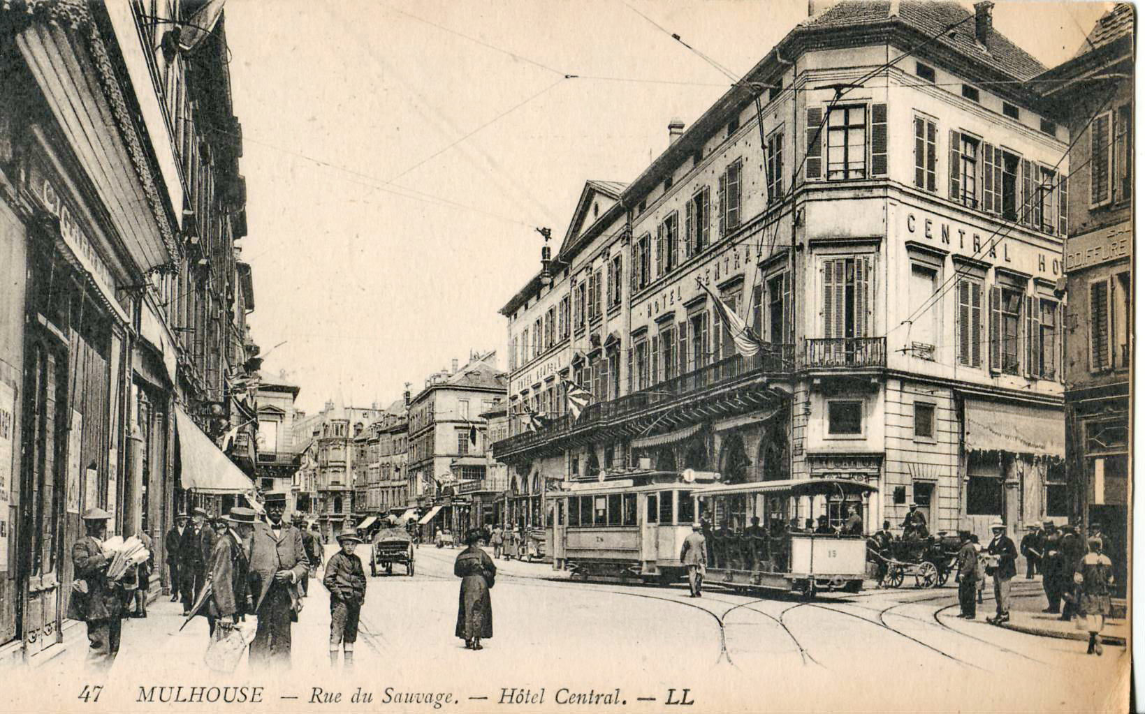 Carte postale ancienne éditée par LL, n°47 : MULHOUSE - Rue du Sauvage